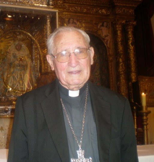 Mons. Iguacen